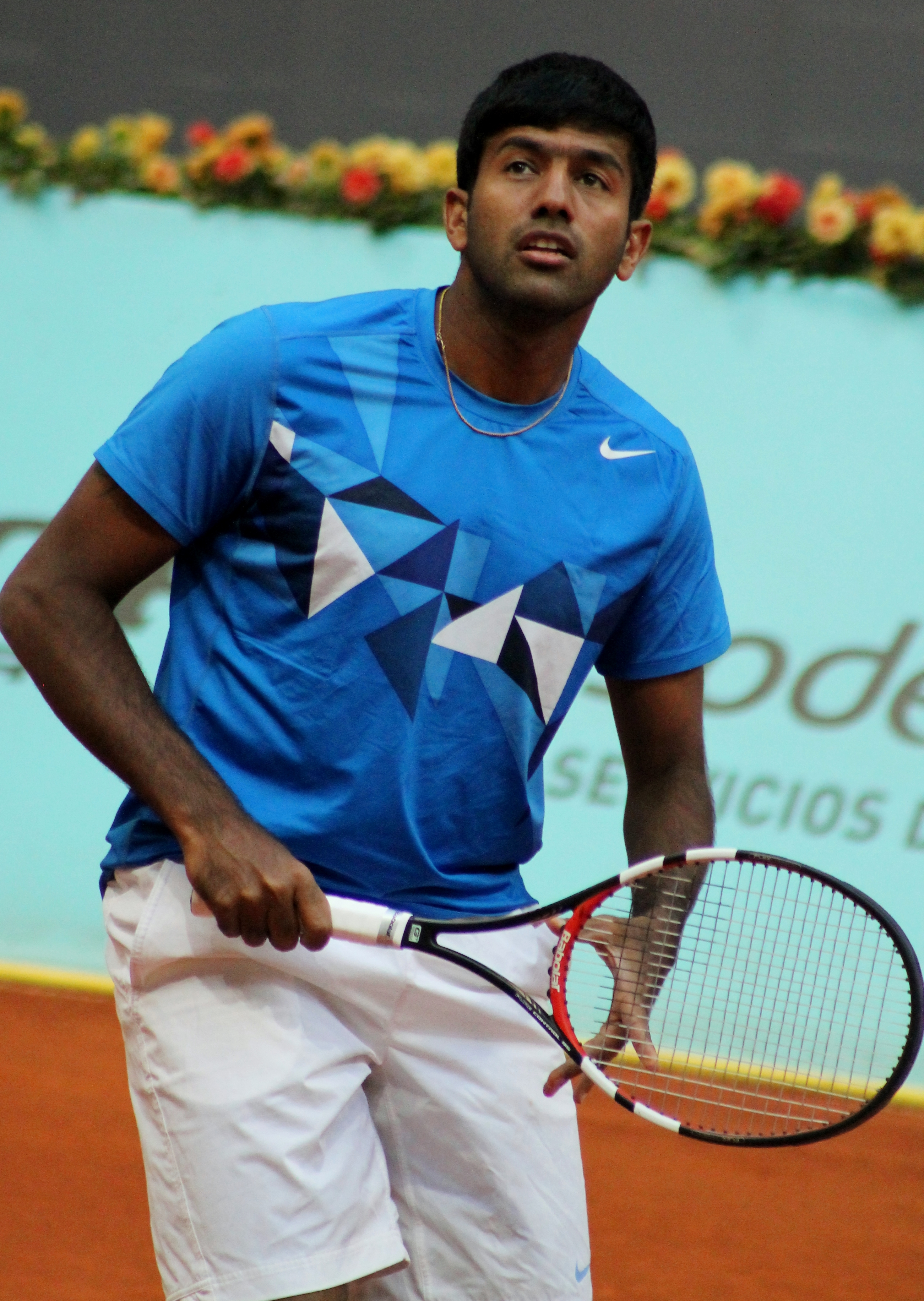 Bopanna MA14 (12)